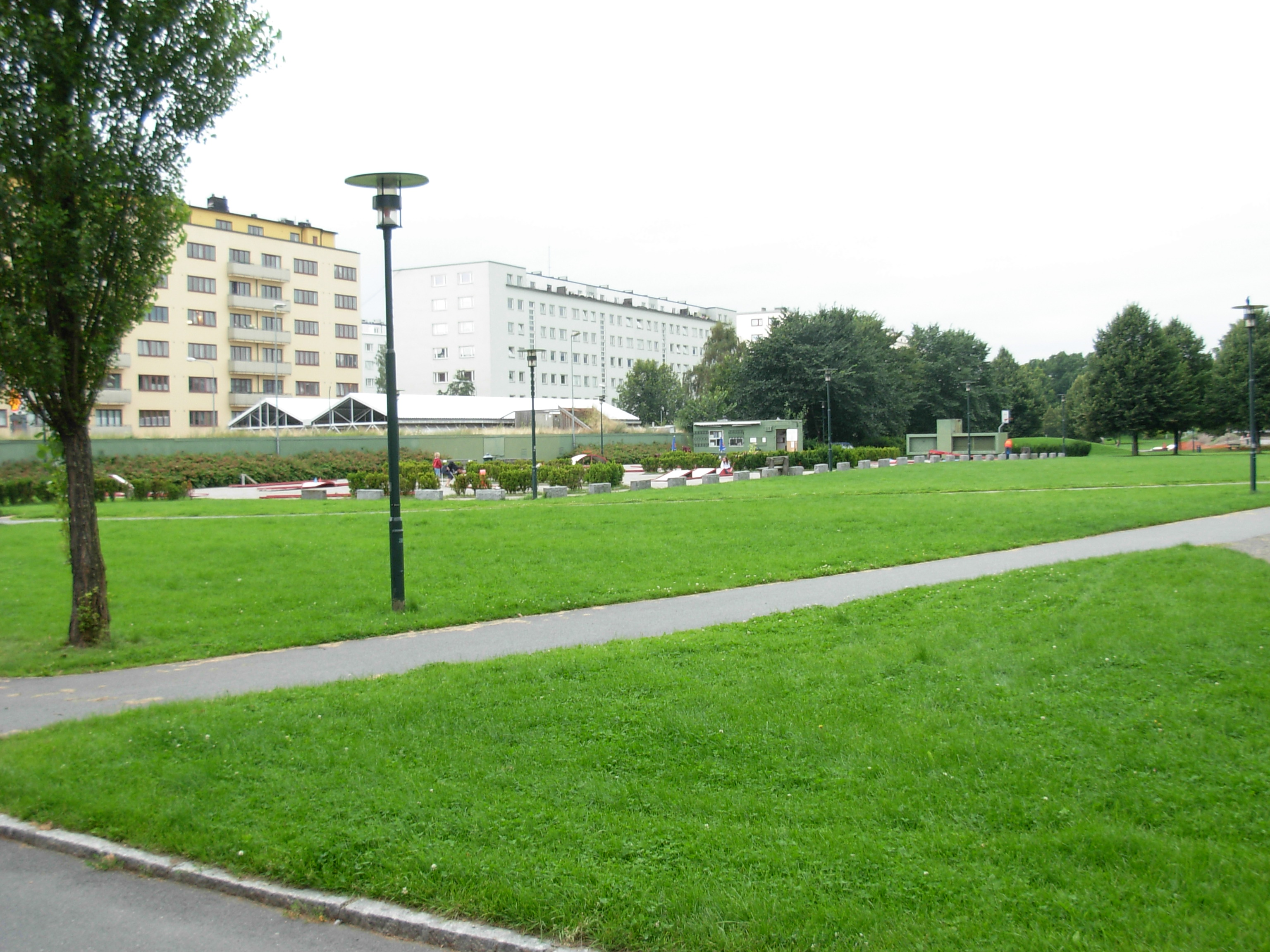 Marienlystparken, Oslo